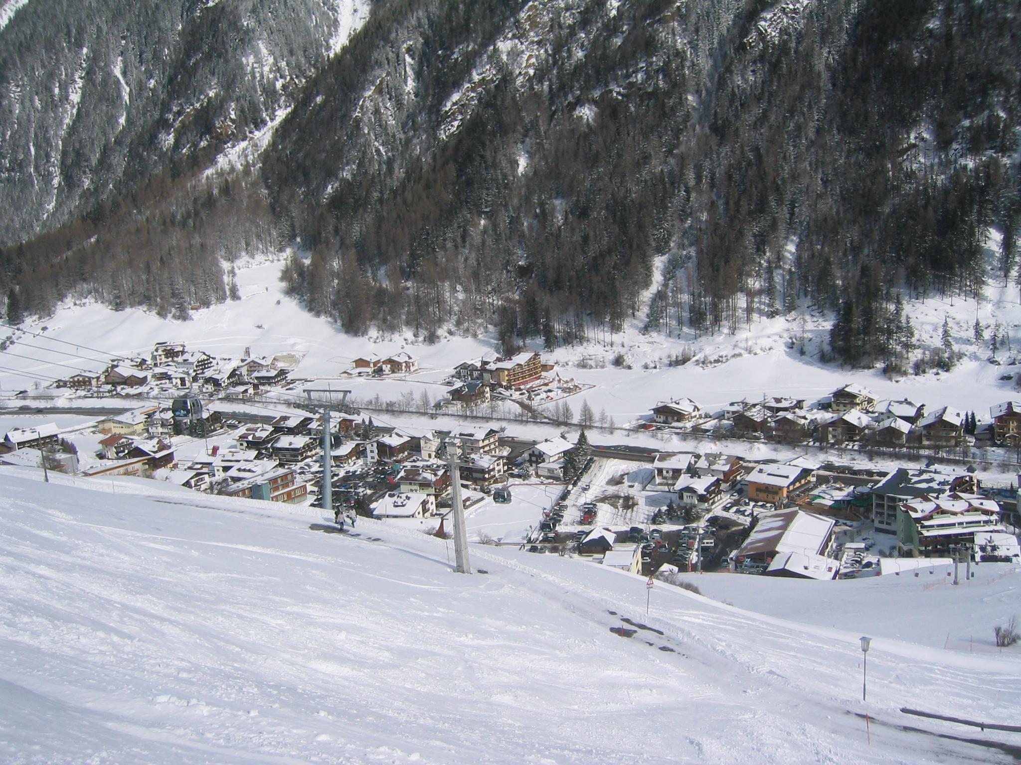 Maart 2006